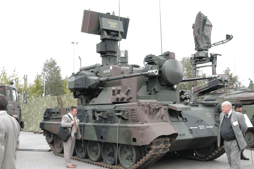 PZA LOARA na wystawie w Kielcach, wrzesień 2007